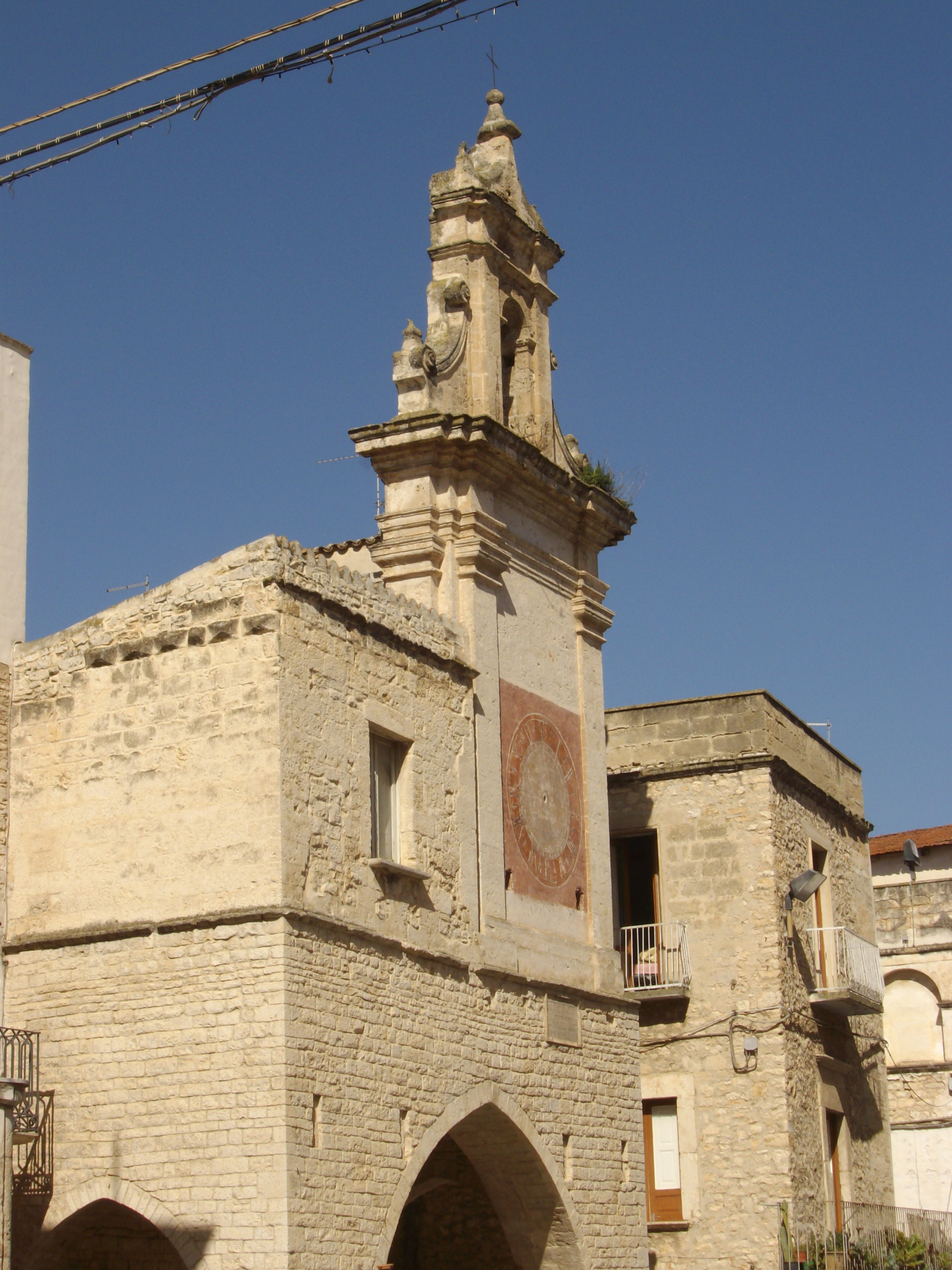 Palazzo civile a Bitetto